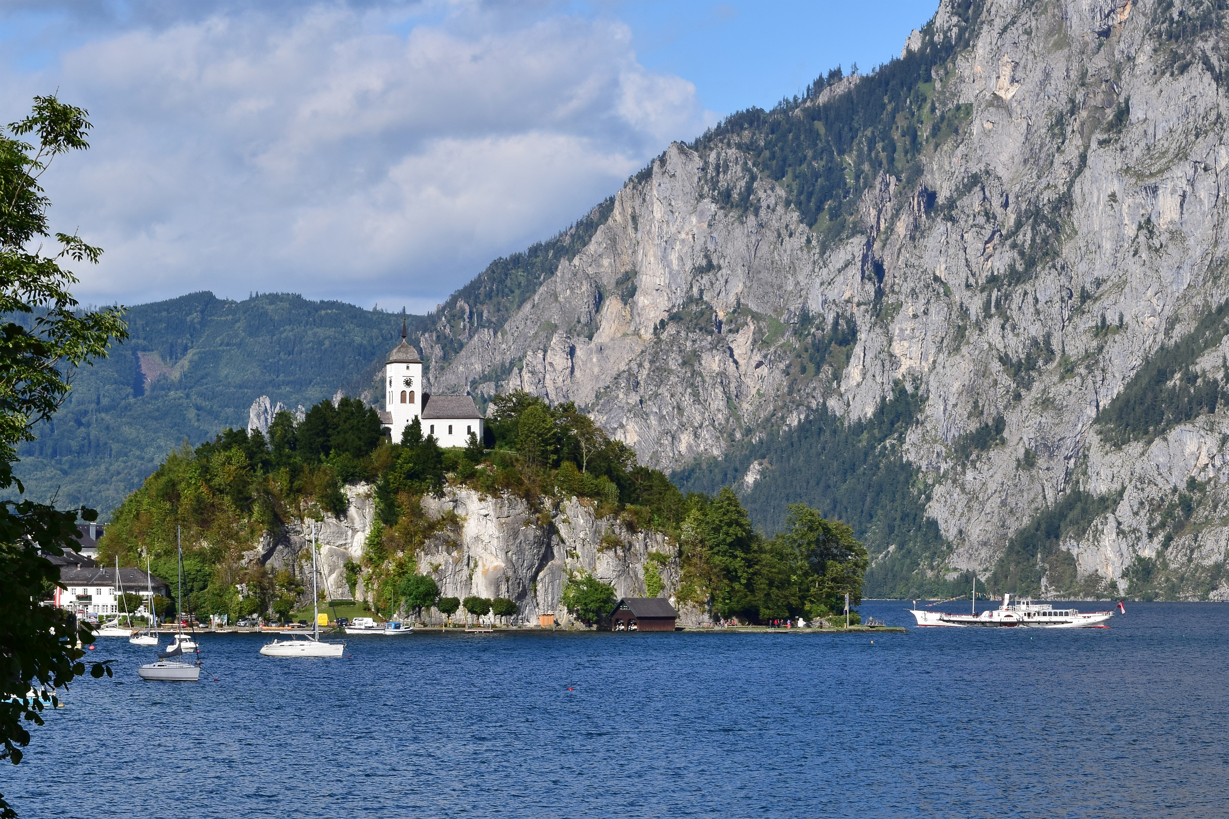 Links die Kapelle hl. Johannes der Täufer in Traunkirchen, rechts der zum Bezirk Gmunden gehörende Traunstein sowie das Dampfschiff "Gisela" am Traunsee Dieses Bild wurde anlässlich des österreichischen Tags des Denkmals 2015 in Oberösterreich eingereicht.